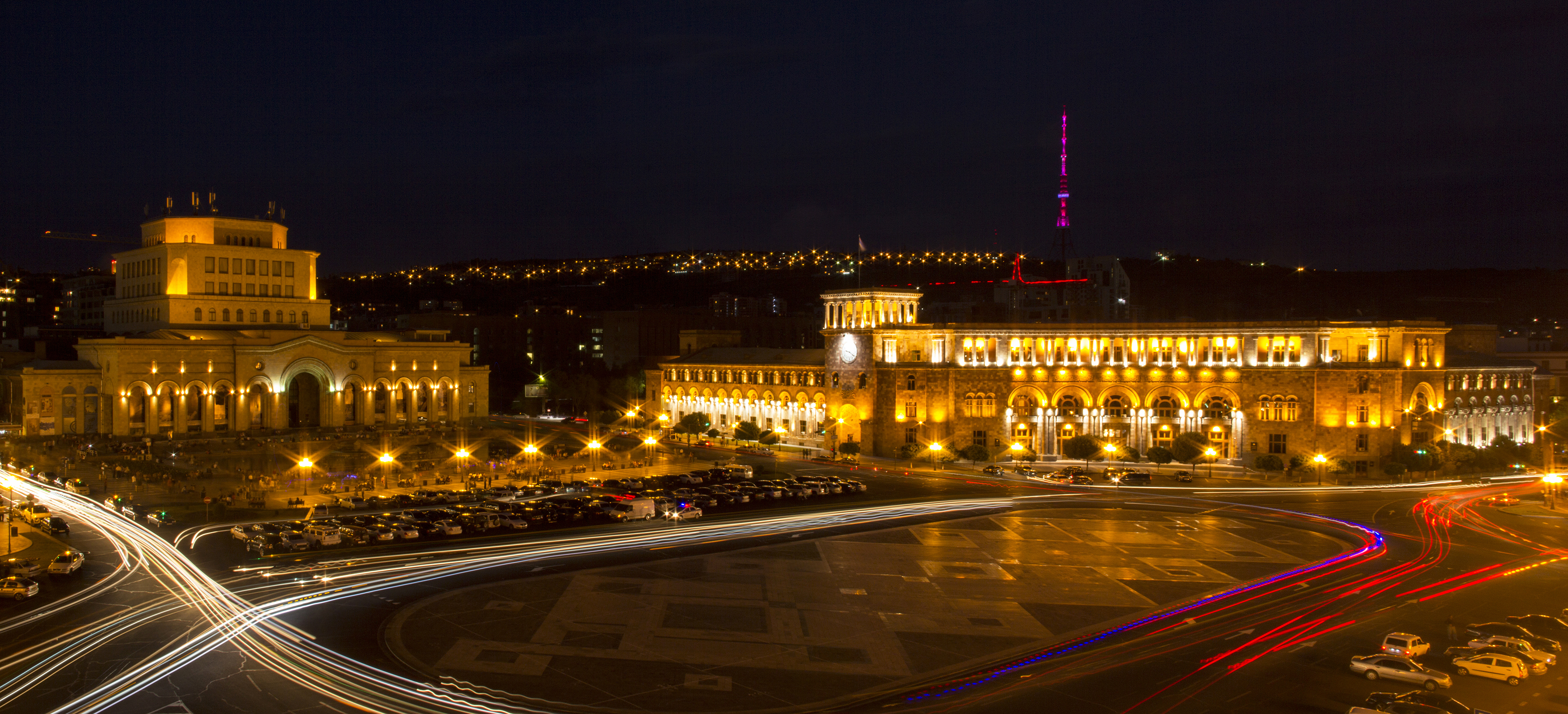 Сучасний Єреван 6/96